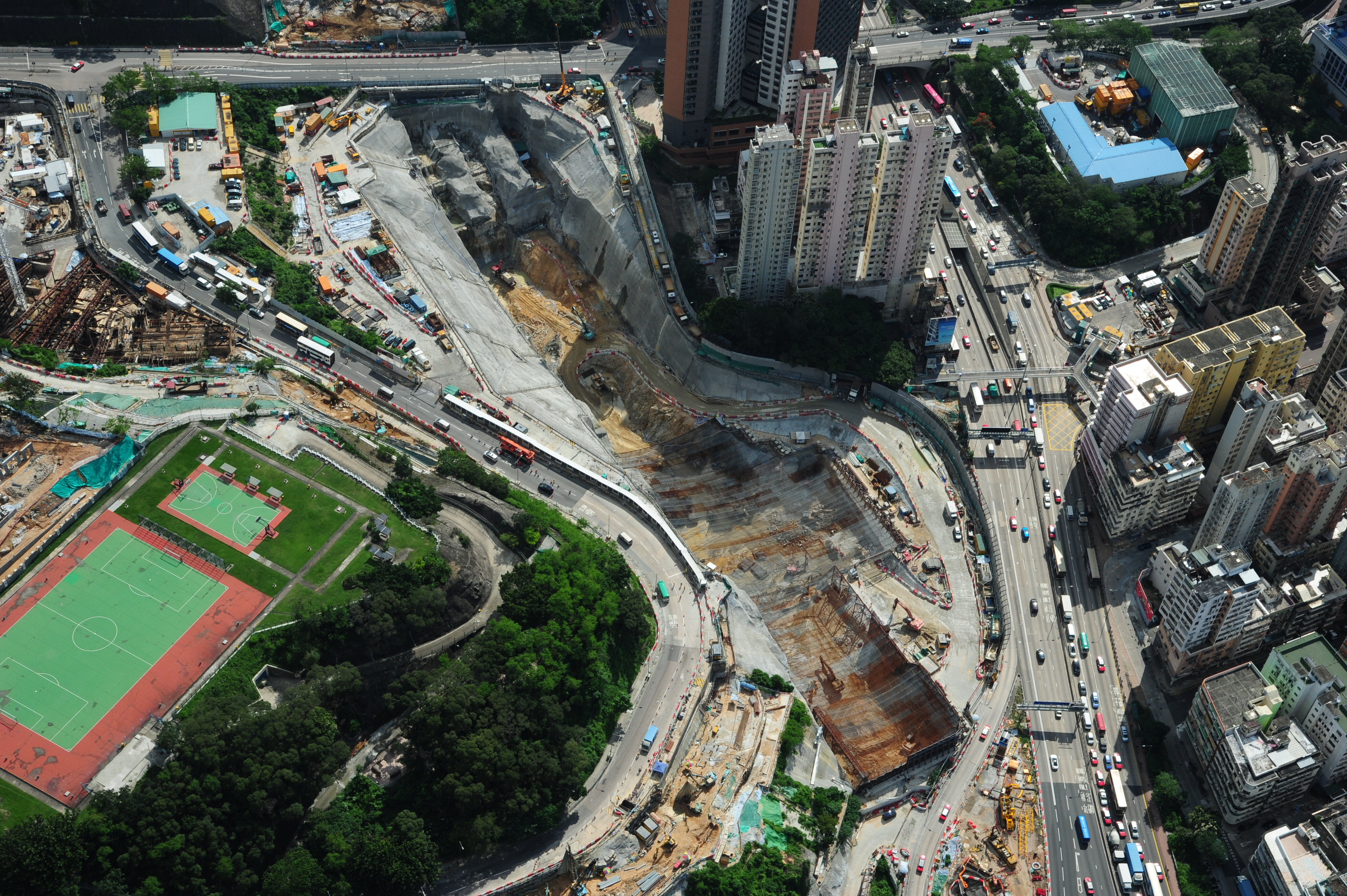 Hung Hom, Hong Kong